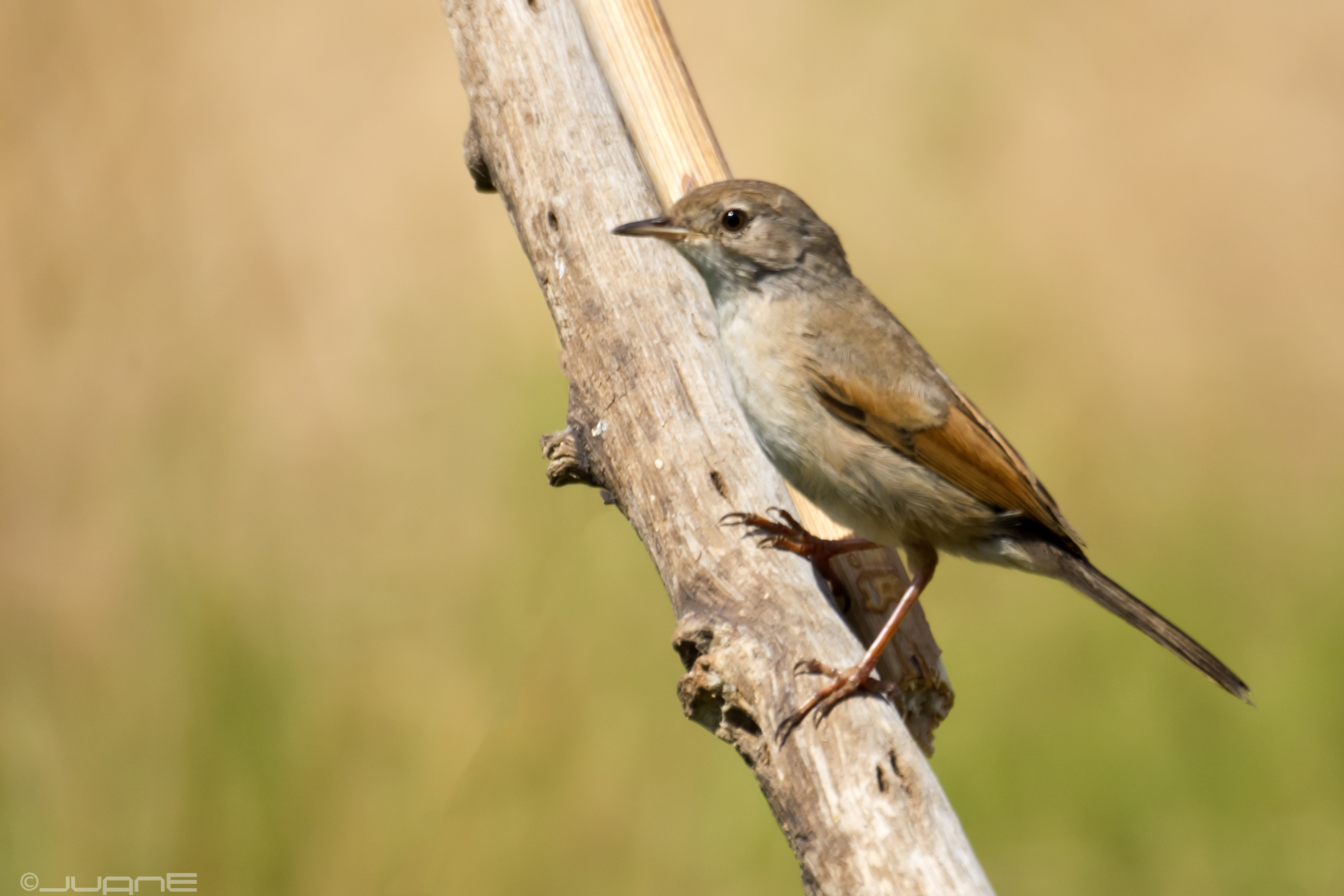 Curruca tomillera, Sylvia conspicillata orbitalis Ssp.♀